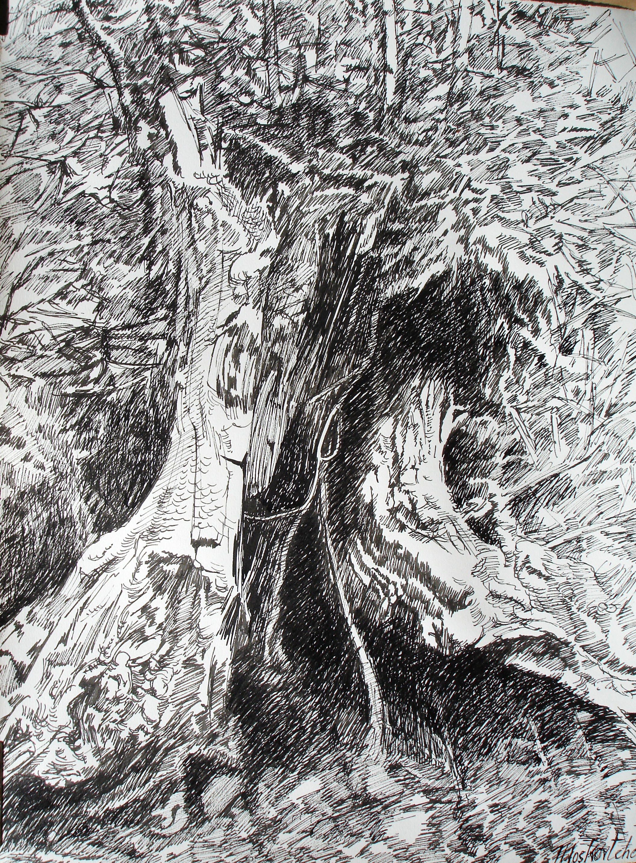 Chataîgnier en Lozère, encre de Chine 65 × 50 cm